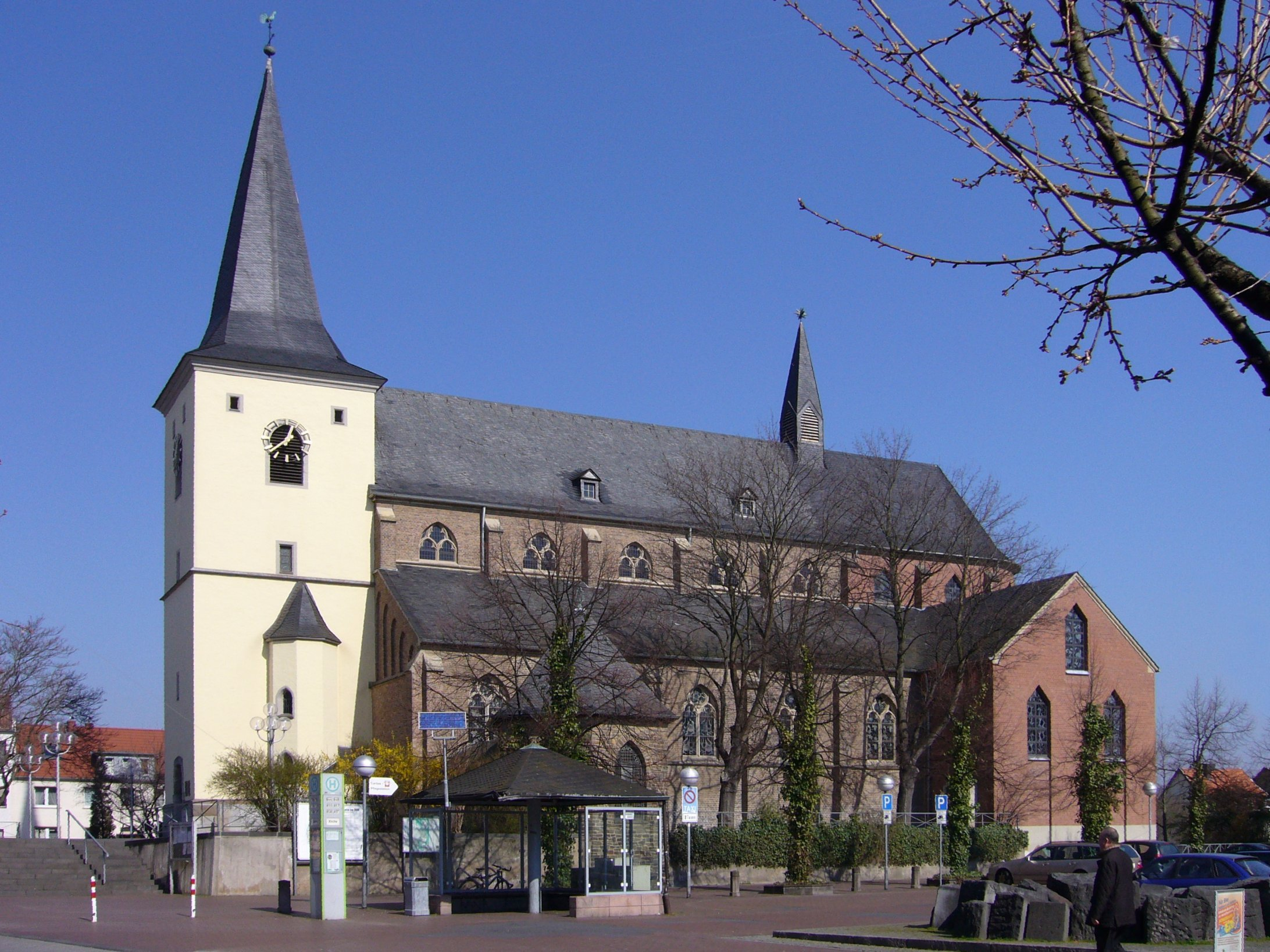 Pfarrkirche St. Johannes der Täufer, Meckenheim, Deutschland, vor der Neugestaltung von Hauptstraße und Kirchplatz.